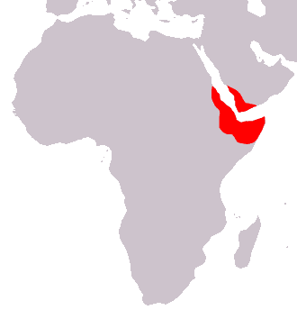 Carte de répartition du babouin hamadryas (Papio hamadryas).